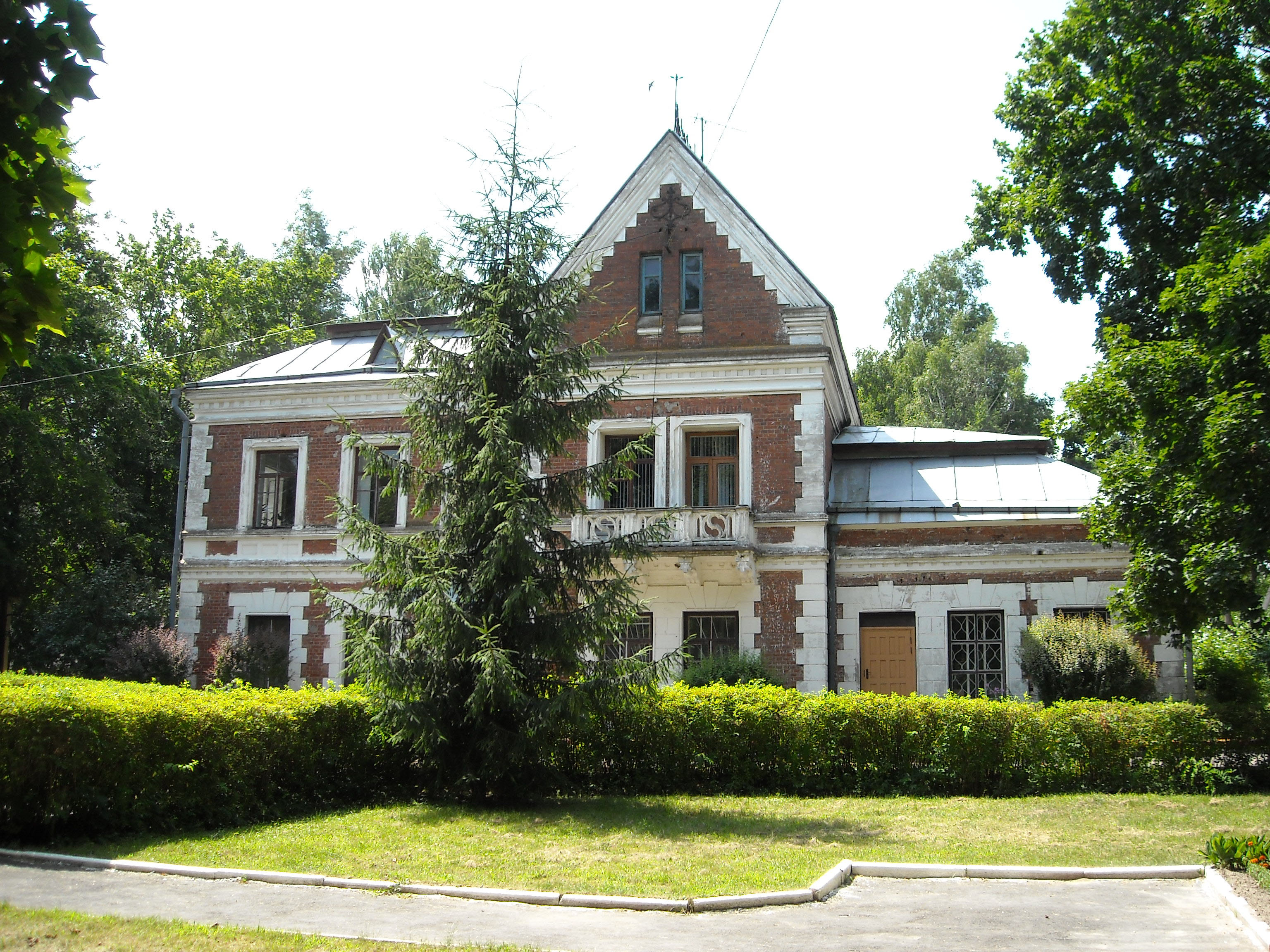 Беларуская (тарашкевіца): Палацава-паркавы комплекс Козелаў-Паклеўскіх. в. Красны Бераг This is a photo of Belarusian heritage monument. Reference number: 312Г000324 ( WLM)